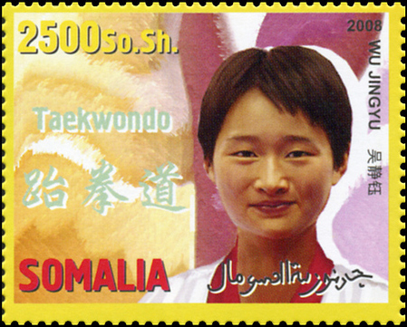 Wu Jingyu